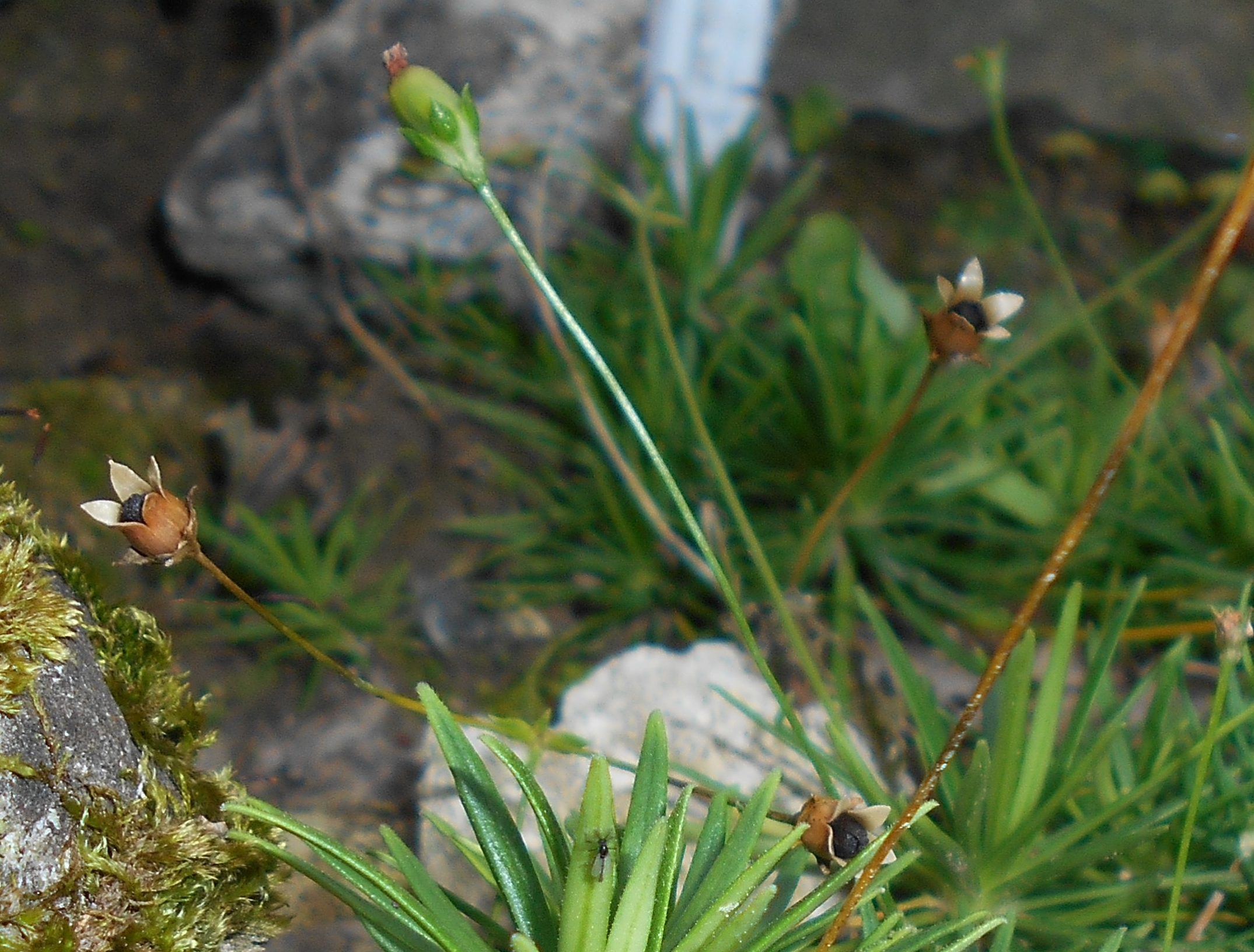 Naradka mlecznobiała (Androsace lactea), Ogród Botaniczny UMCS w Lublinie.